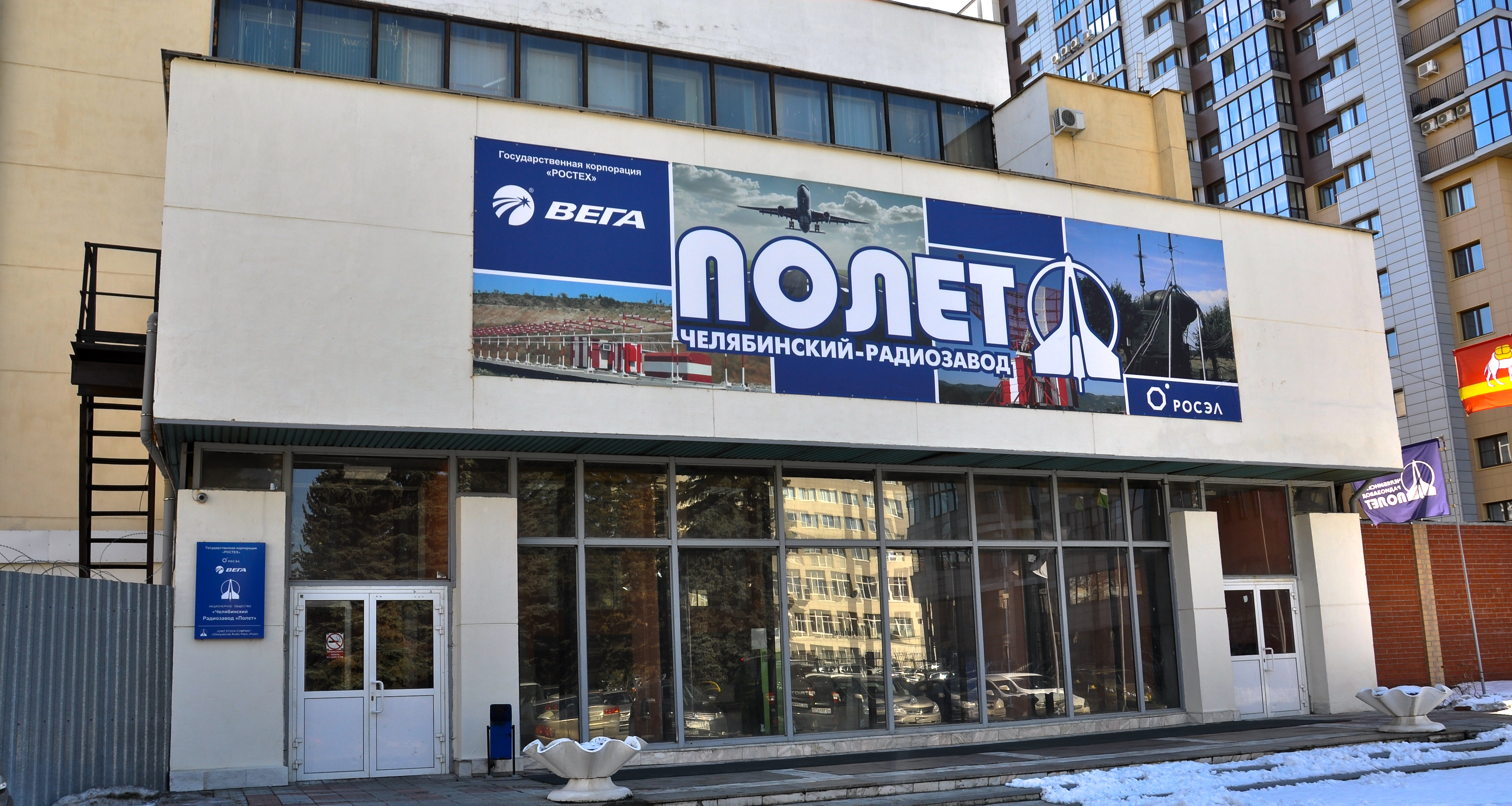 АО "ЧРЗ"Полёт" расположен в центре Челябинска